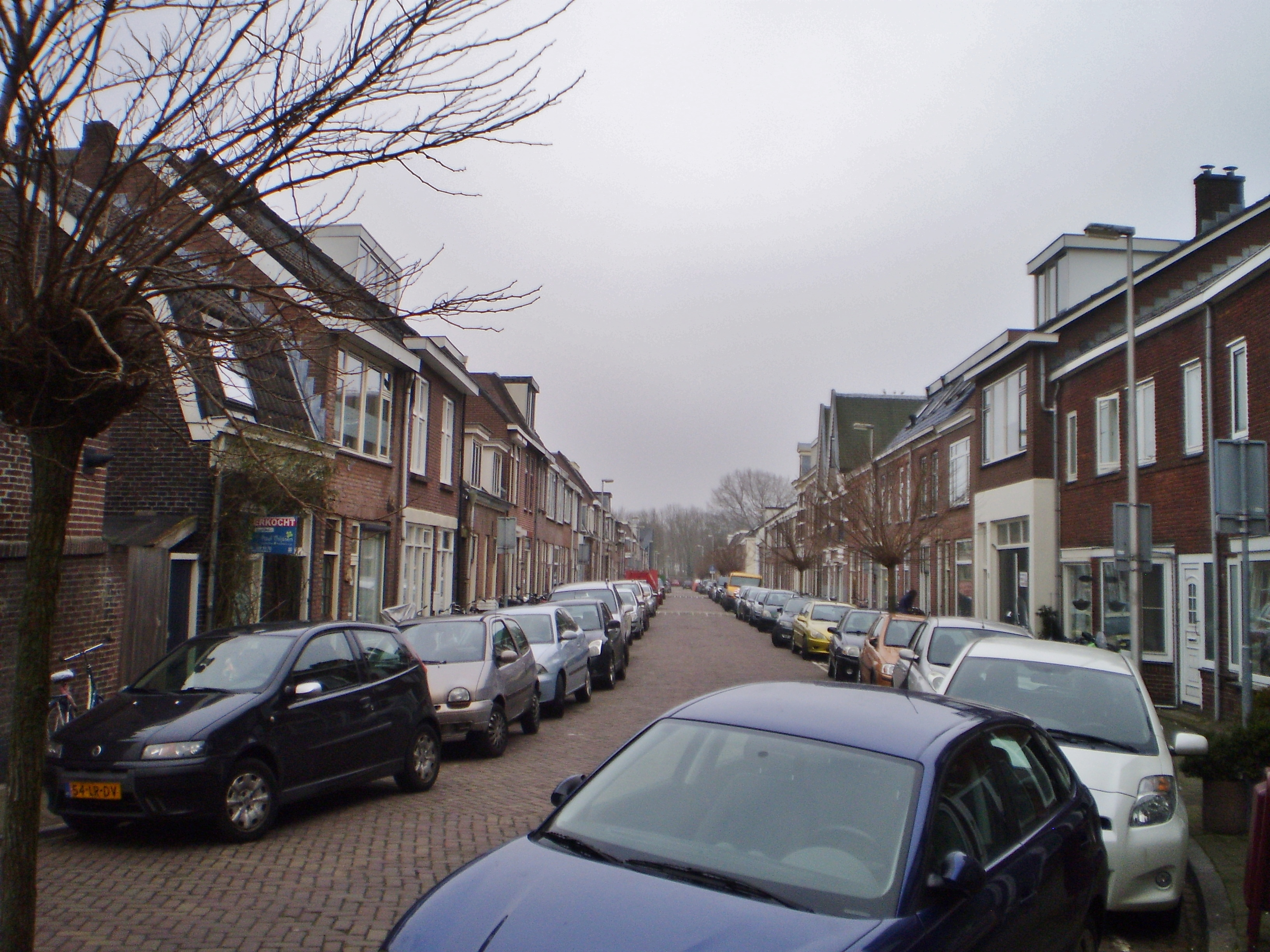 Hoogstraat vanaf de Lauwerecht richting Loevenhoutsedijk